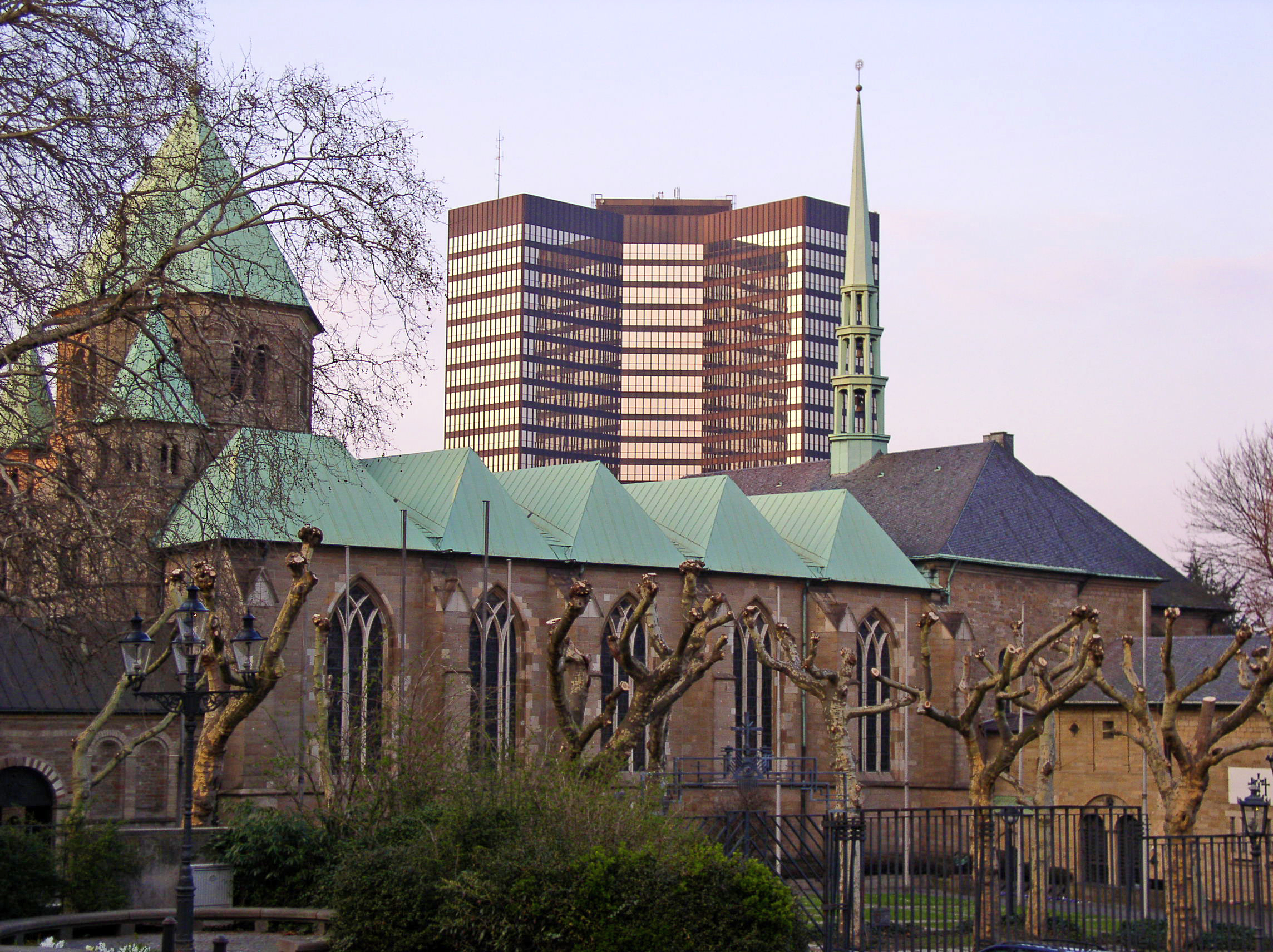 Description: Essener Münster, im Hintergrund das Rathaus Source: photo taken by me, March 27, 2004 Photographer: Baikonur